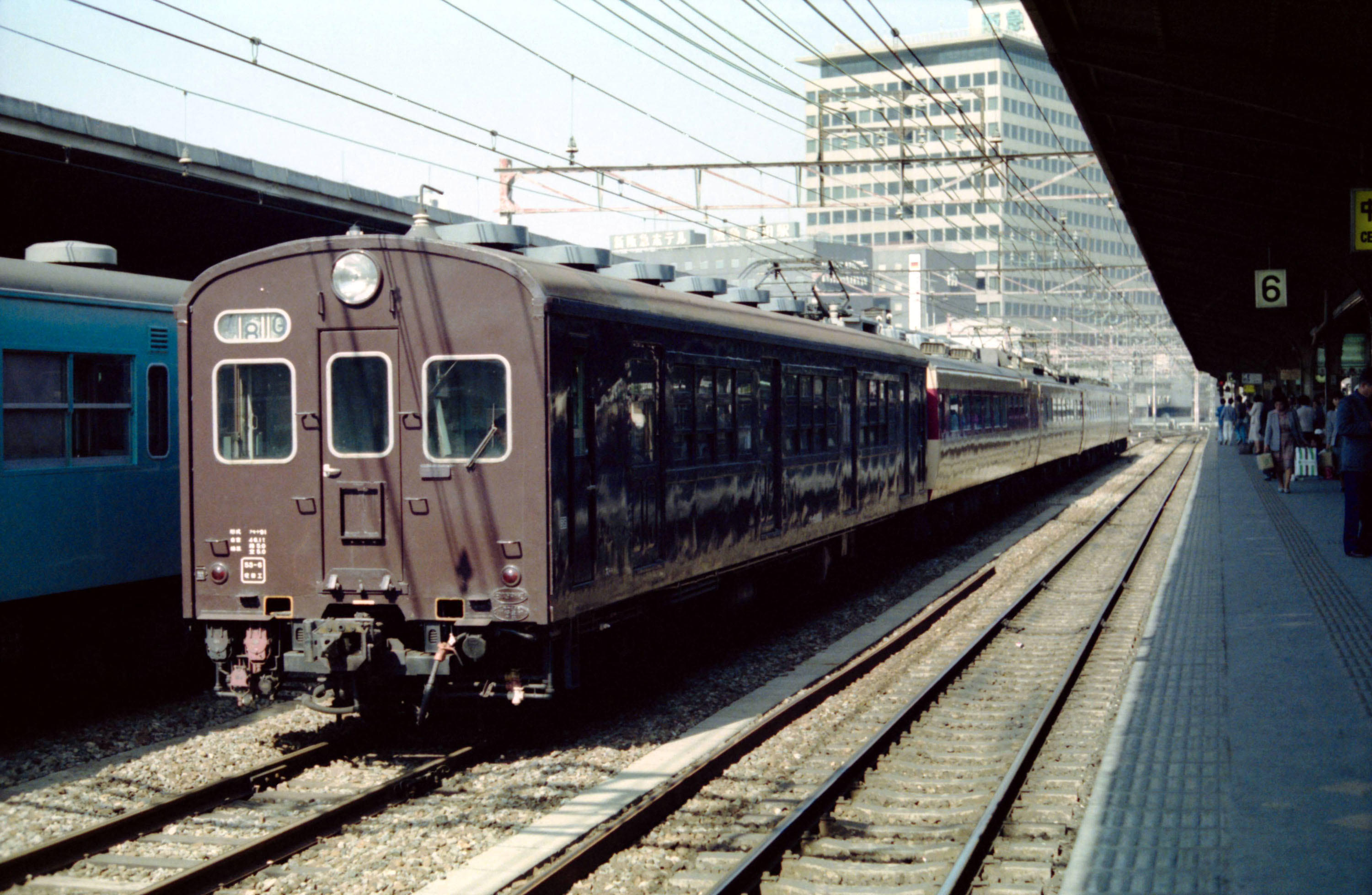 国鉄 事業用車両 クモヤ９１ 大阪駅 Ｓ５５